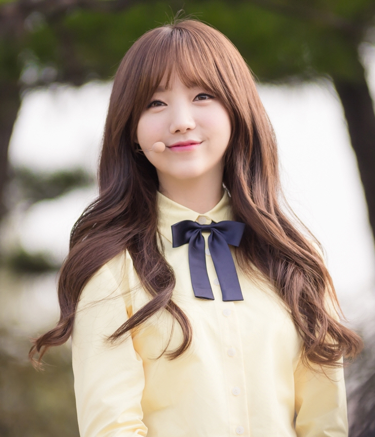 151023 러블리즈 뮤직뱅크 미니팬미팅 - 02